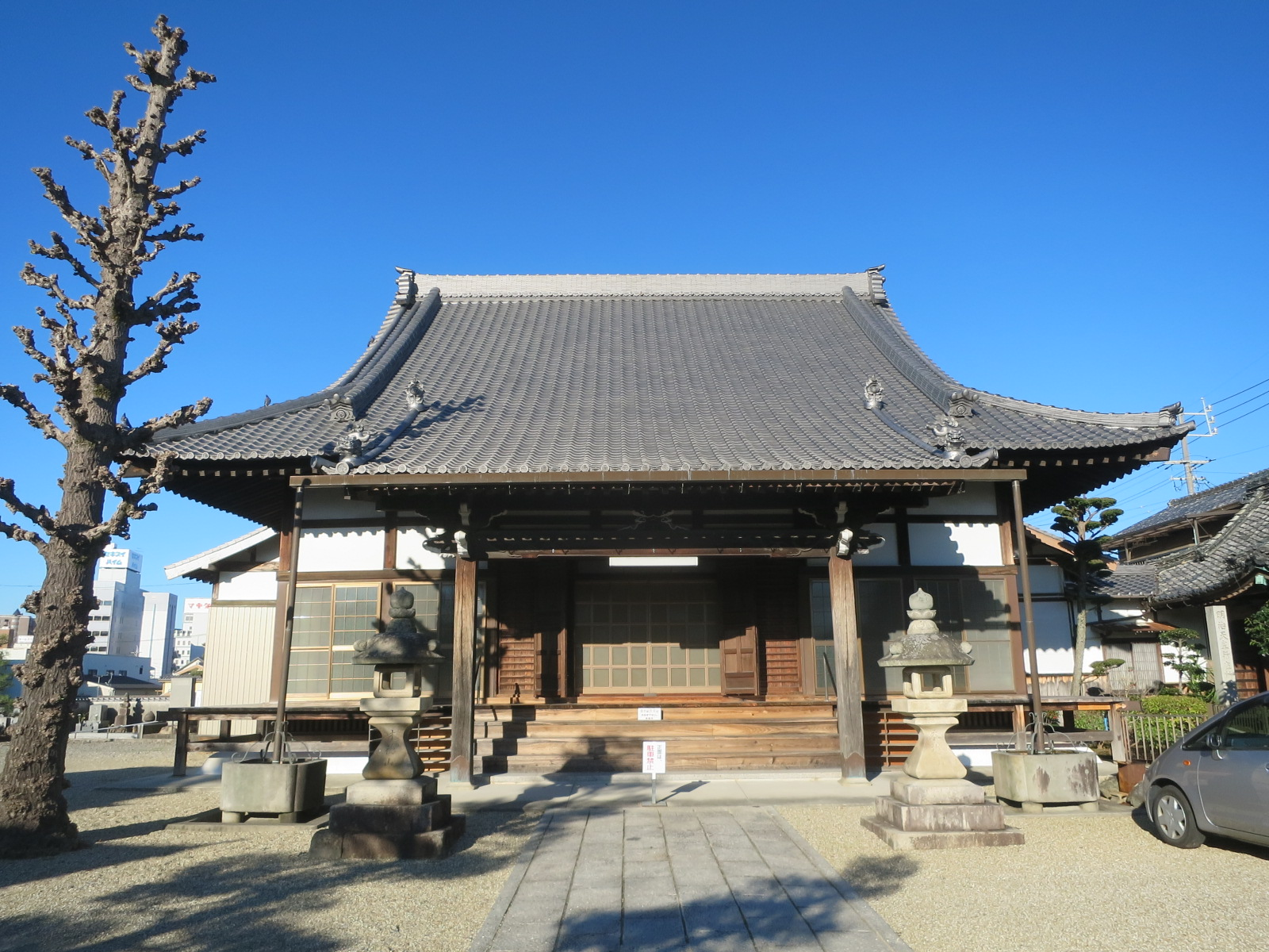 岡崎市 専福寺